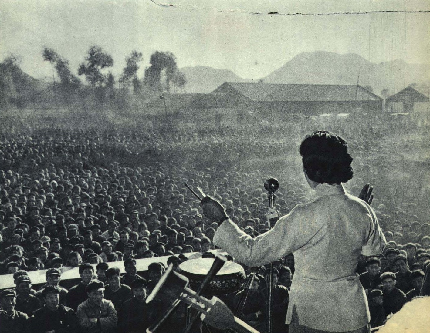 1963-01 1963年 集体化十周年